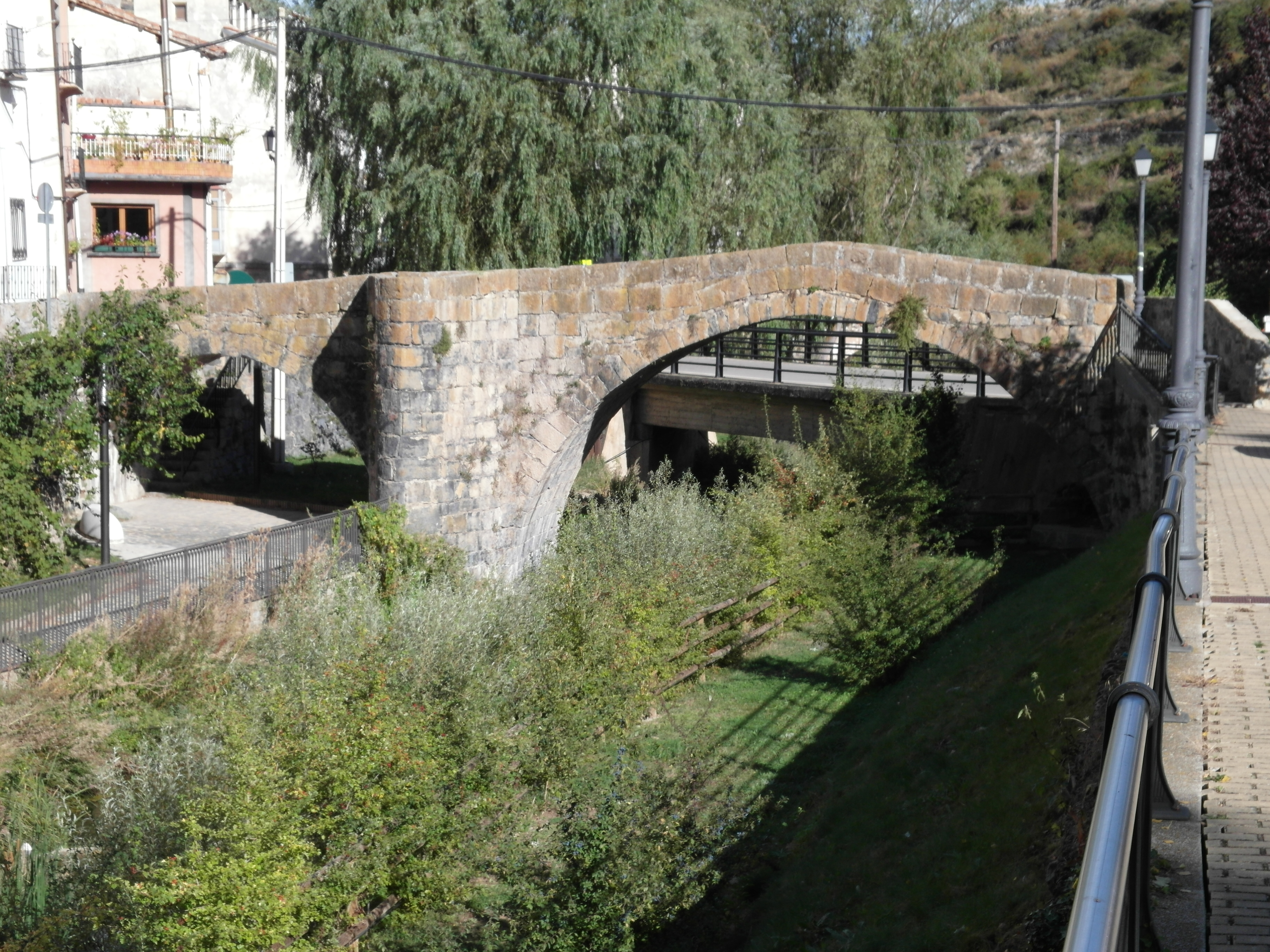 Munilla, La Rioja.